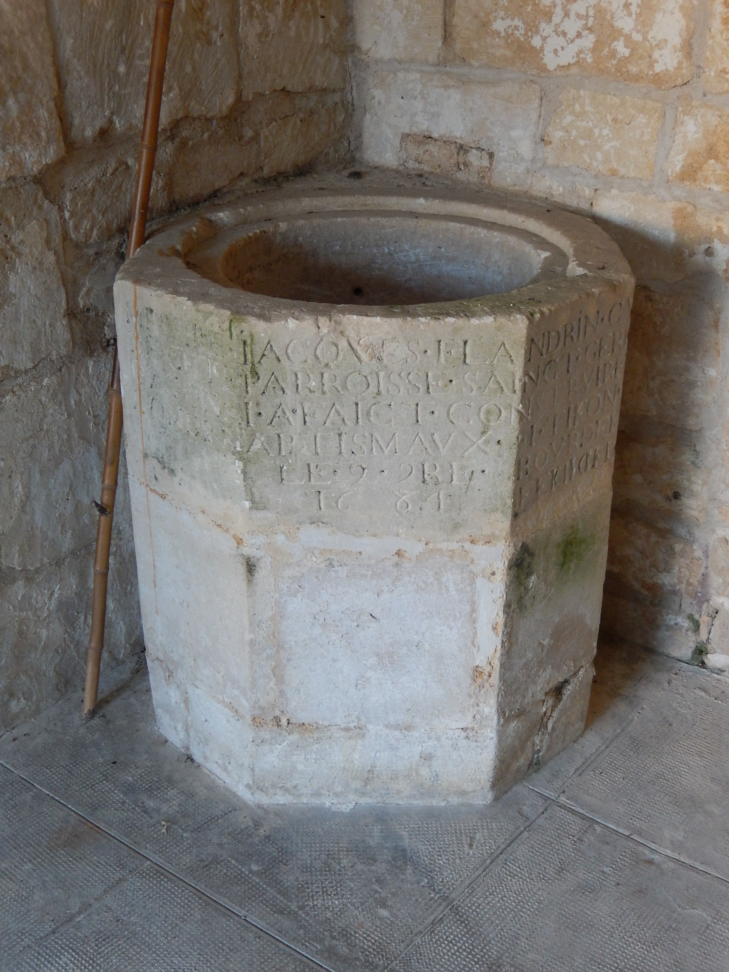 La cuve baptismale de l'église Saint-Germain d'Agonnay, sculptée par un certain Tifon. Son existence remonte à l'année 1684.